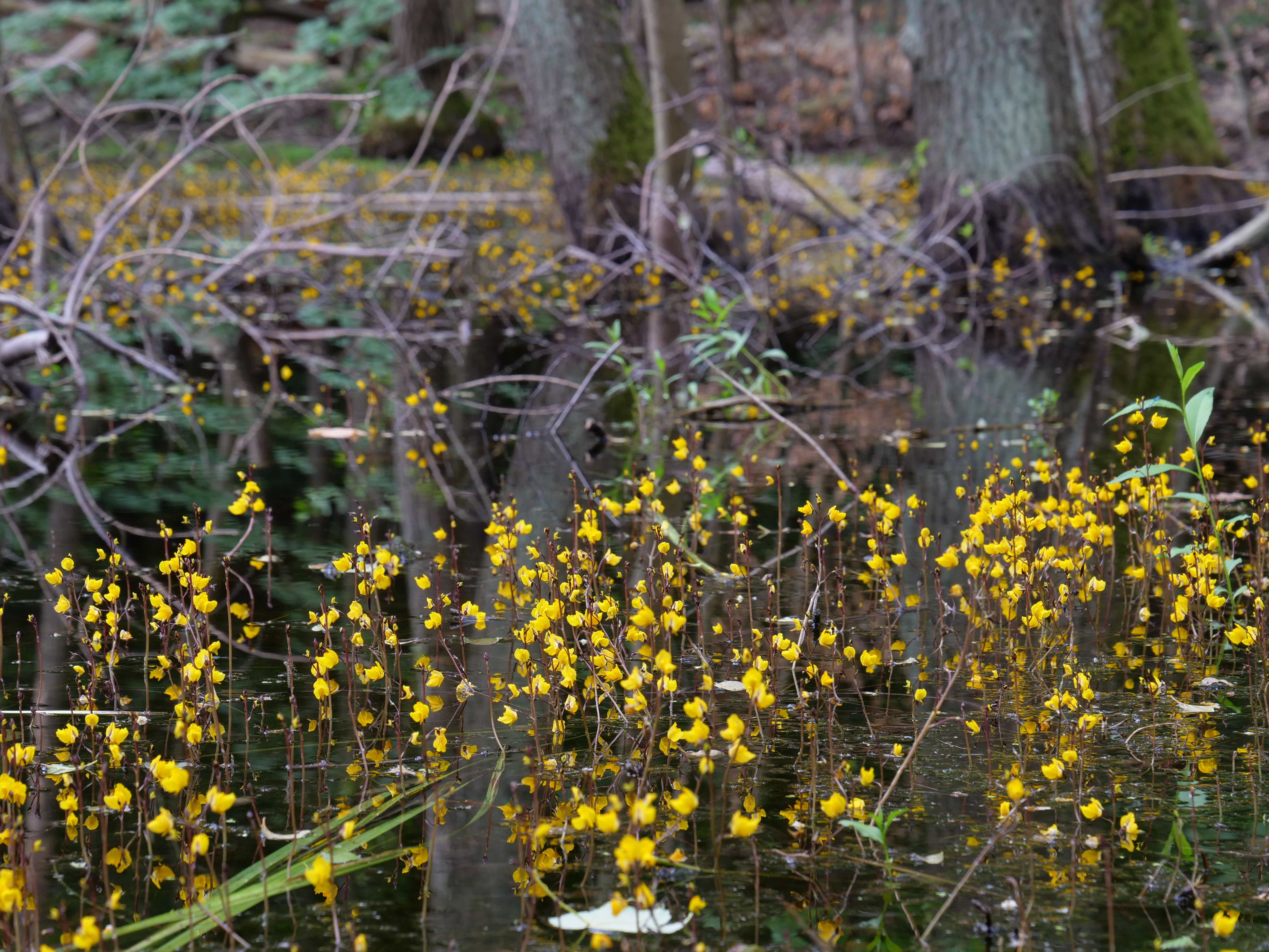 Das Teufelsbruch mit blühendem gemeinem Wasserschlauch.